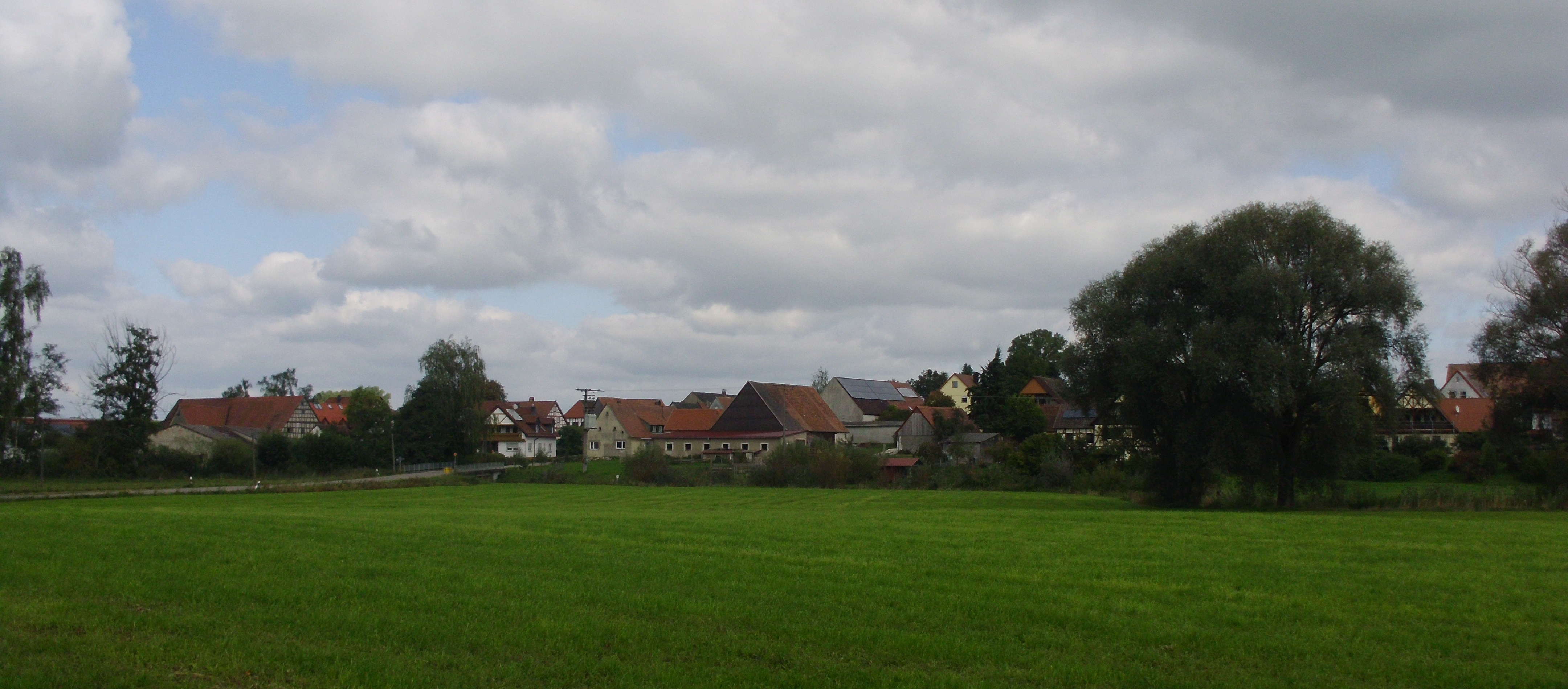 Höchstetten, Ortsteil von Leutershausen im mittelfränkischen Landkreis Ansbach